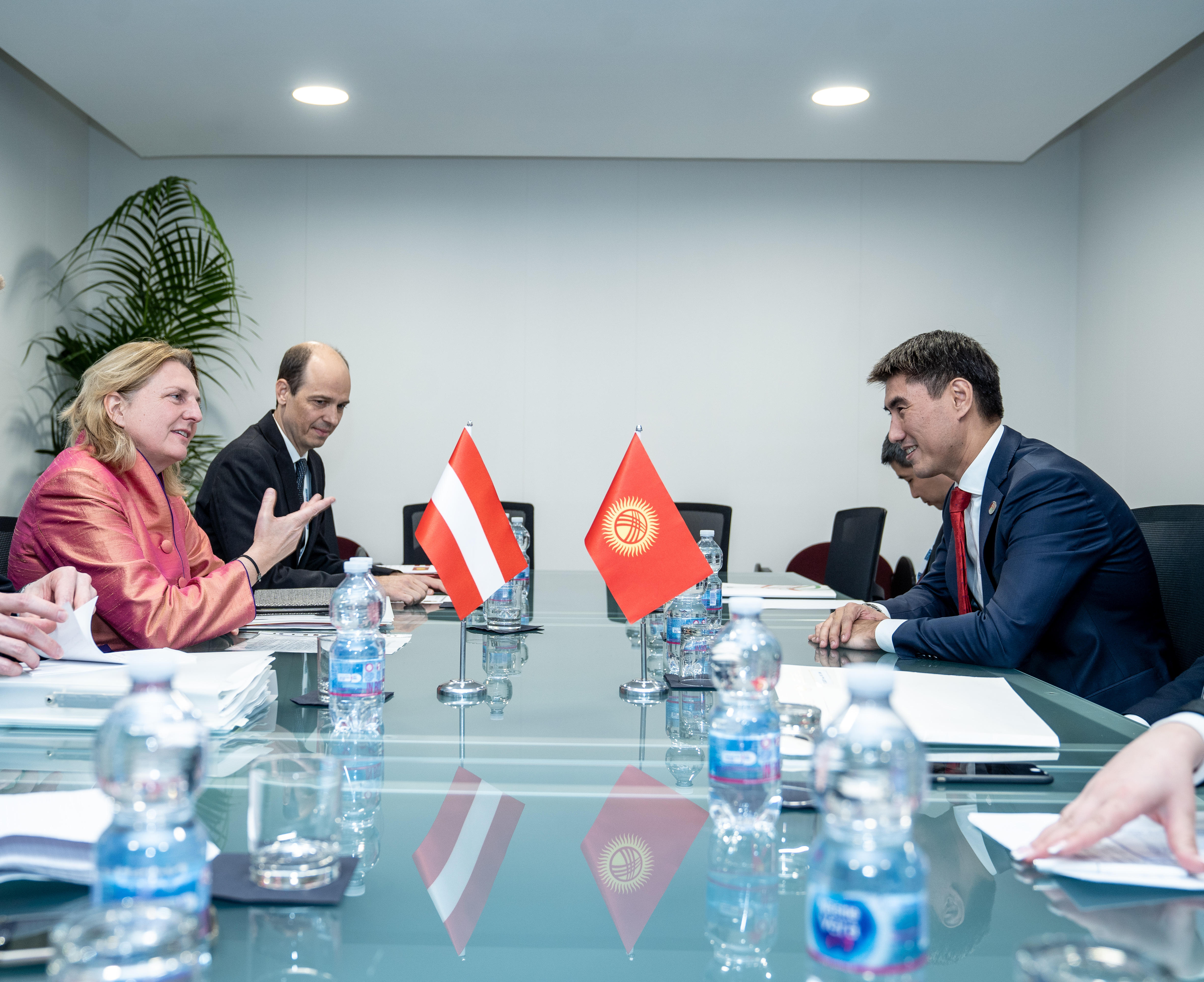 Außenministerin Karin Kneissl im Gespräch mit dem kirgisischen Außenminister Aidarbekov Chyngyz Azamatovich beim OSZE-Ministerrat in Mailand. Foto: BMEIA/Lauber